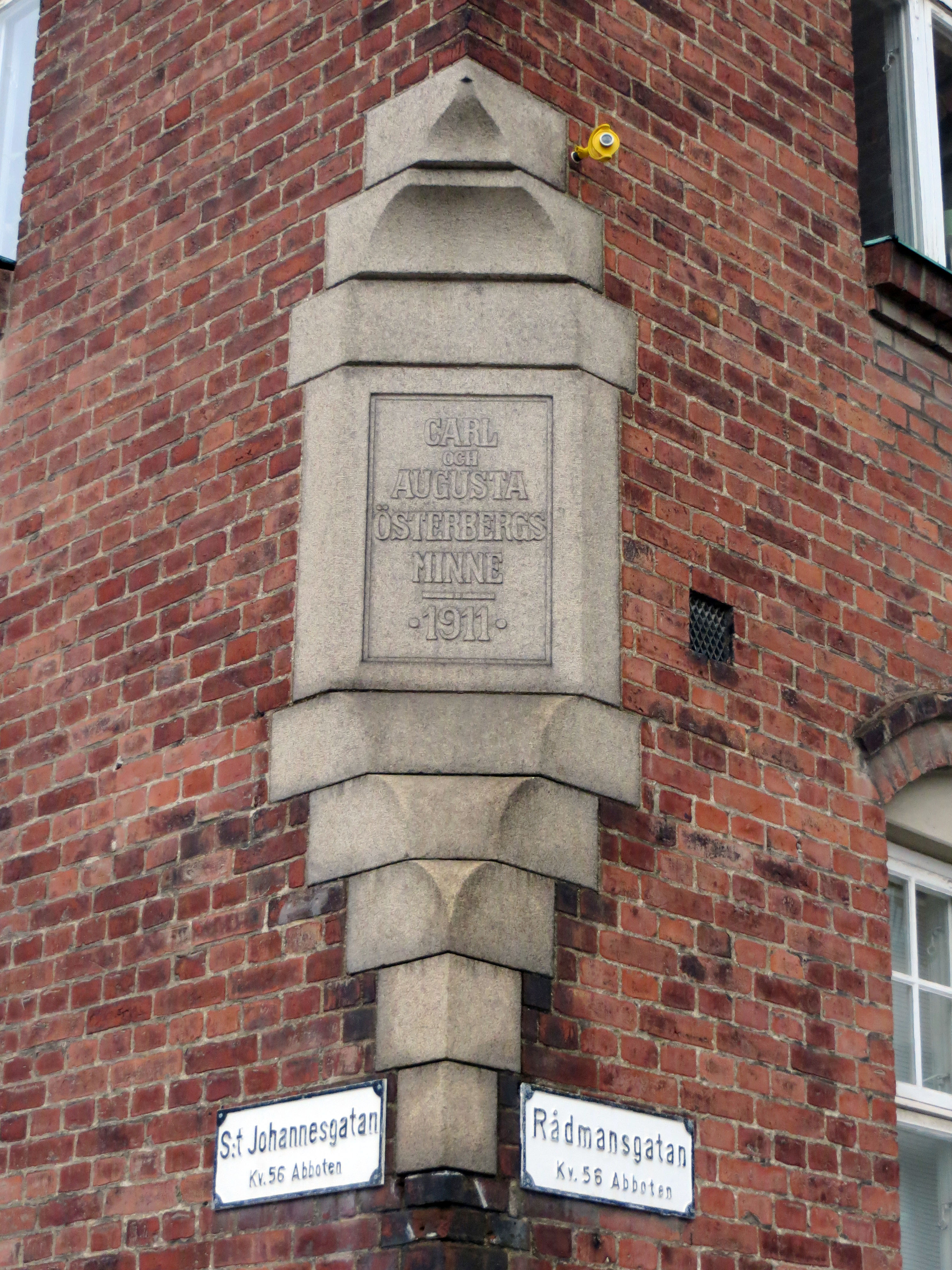 Fasaddetalj från den Österbergska stiftelsen, Rådmansgatan, kvarteret Abboten i Malmö.